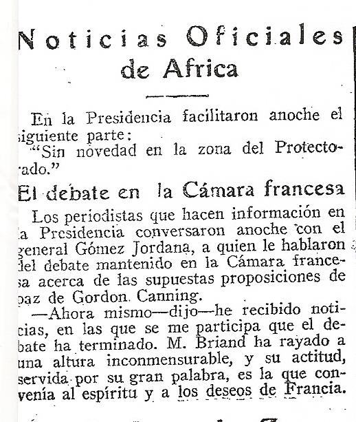 ABC, 1 de Enero de 1926